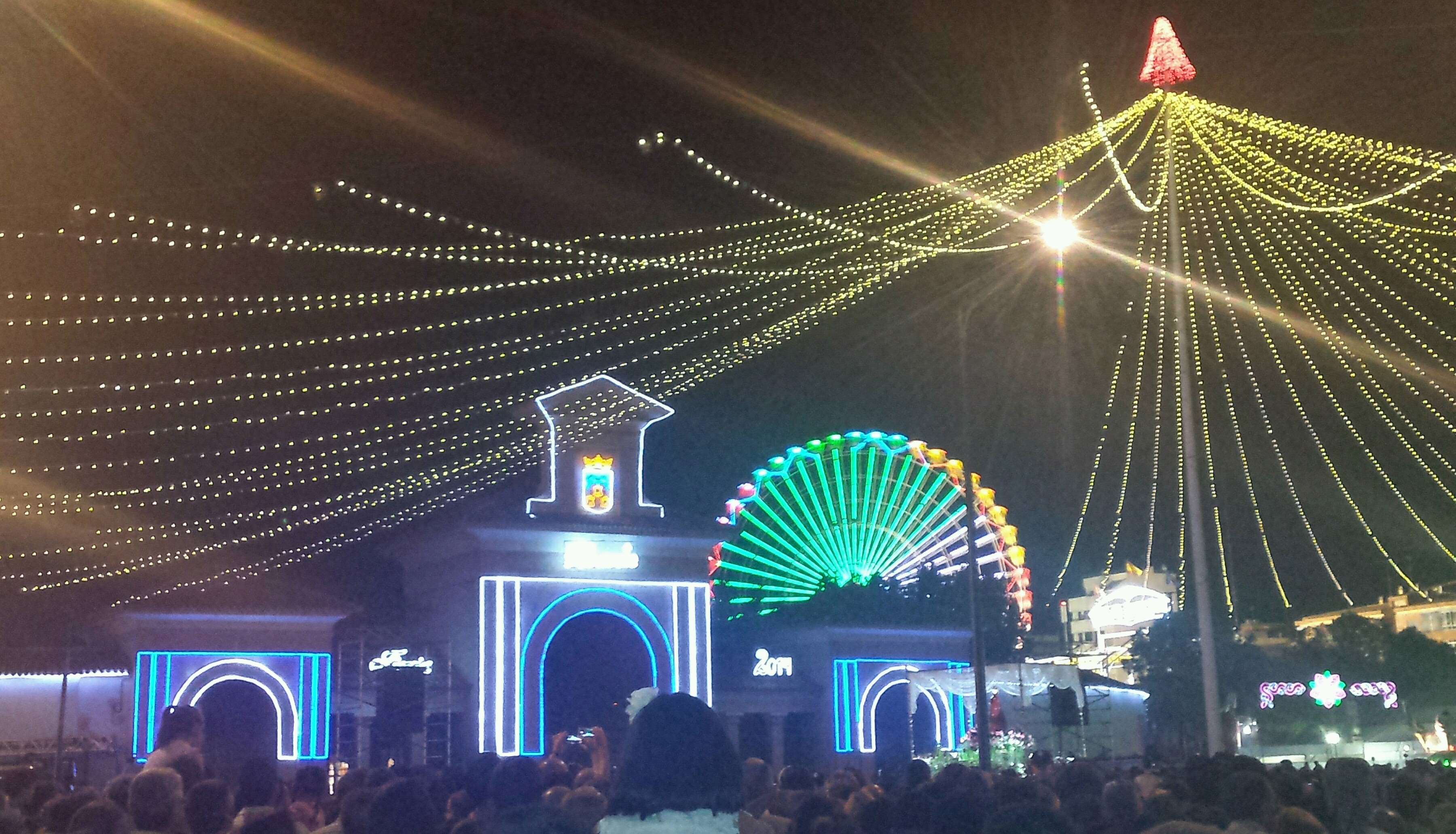 Feria de Albacete 2014. Puerta de Hierros del Recinto Ferial de Albacete